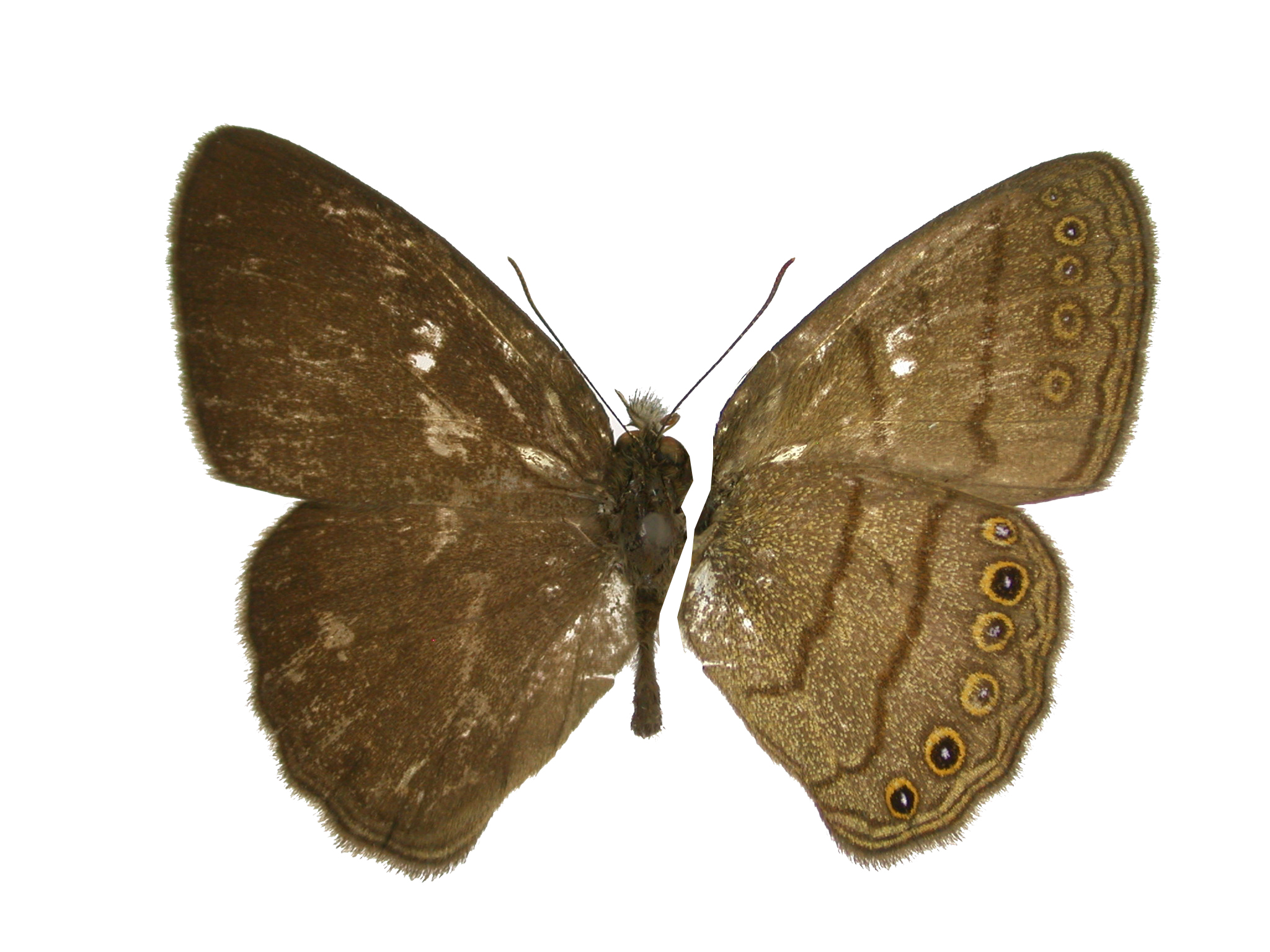 Nymphalidae Ecuador